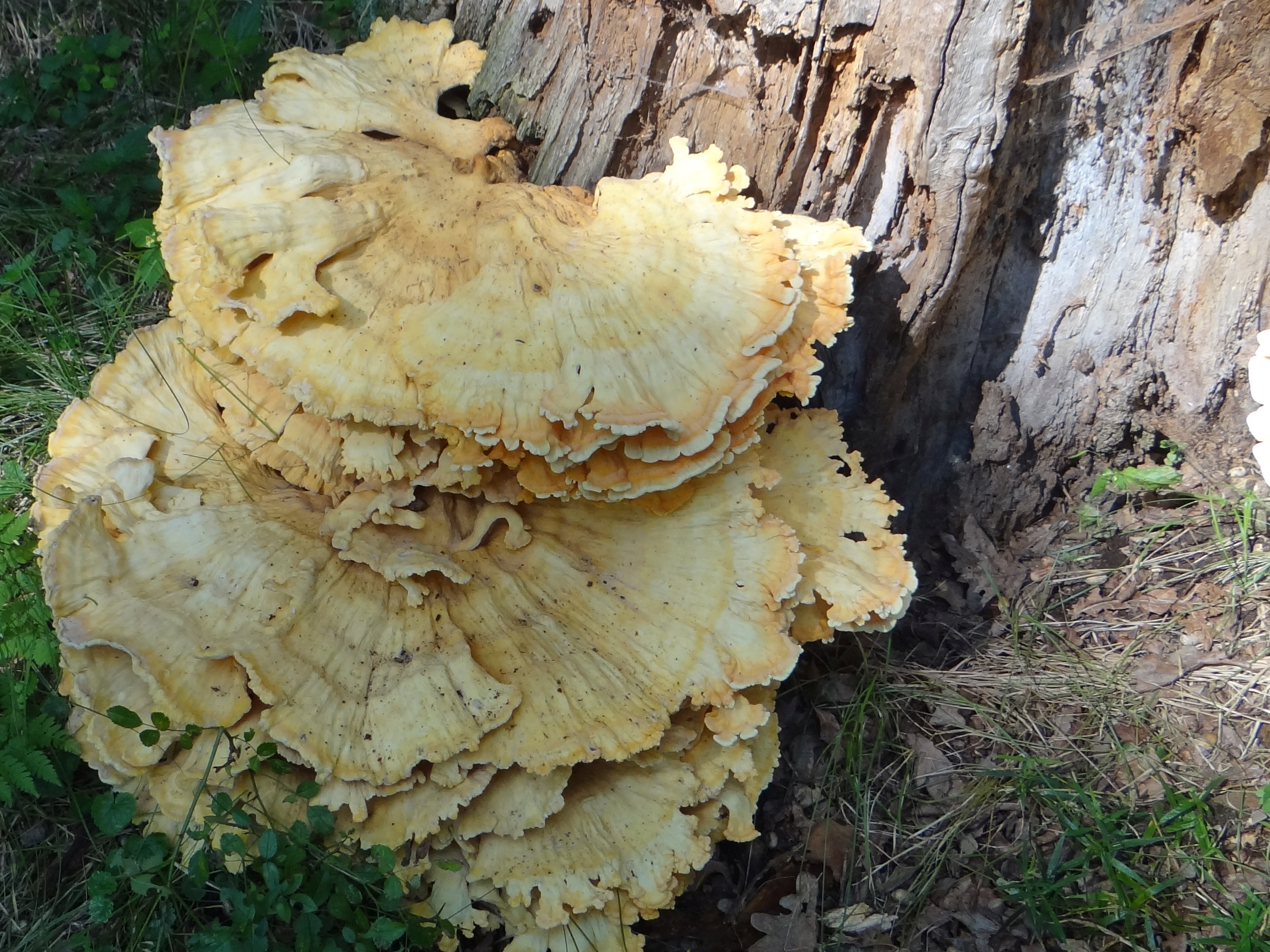 Laetiporus sulphureus on Quercus robur. Location: Poland, Puszcza Niepołomicka. Rezerwat przyrody "Dębina"